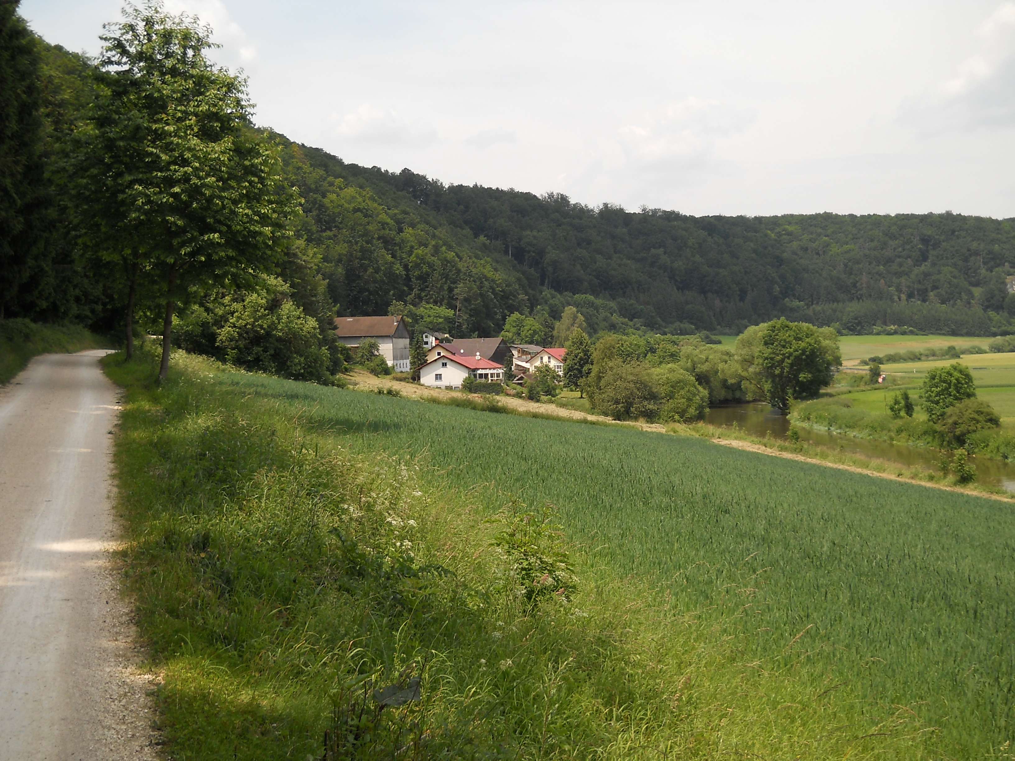 Regelmannsbrunn, Ortsteil der Gemeinde Kipfenberg im oberbayerischen Landkreis Eichstätt, vom Altmühltal-Radweg aus gesehen